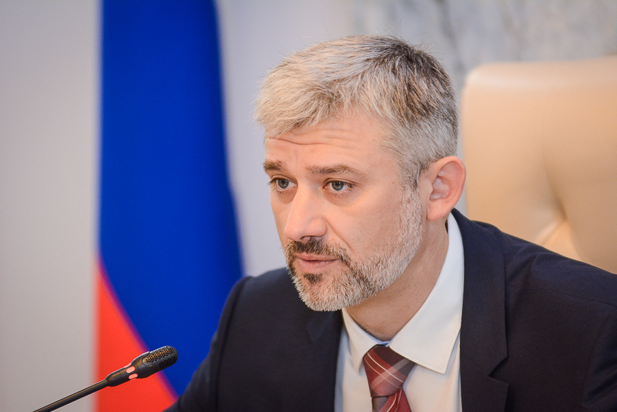 Евгений Дитрих на селекторном совещании, посвященном реализации приоритетного проекта "Безопасные и качественные дороги"